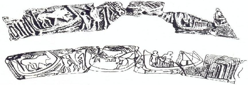 Voorstelling op een wierookbrander van Qustul.